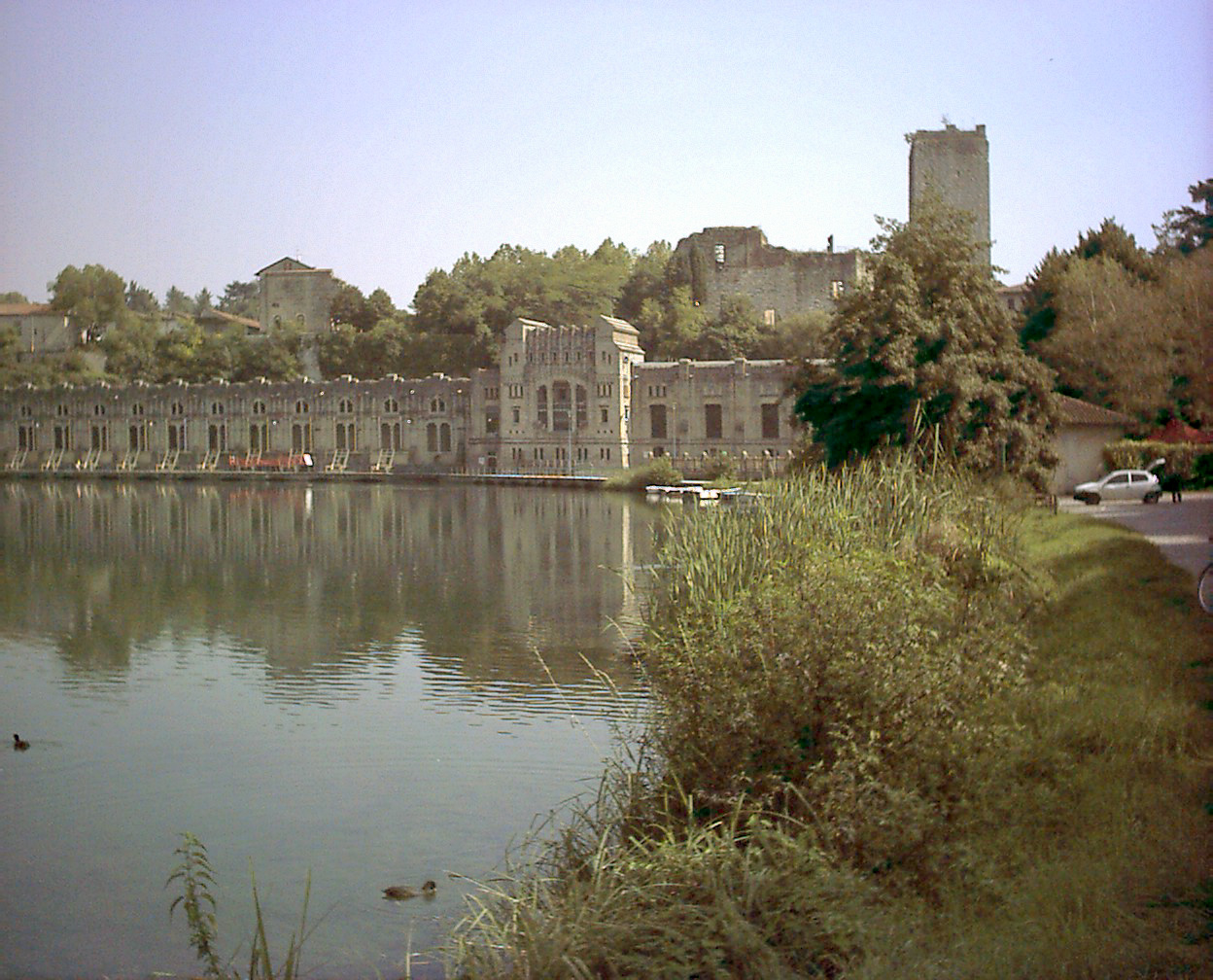 Taccani hydroelectric plant, Trezzo sull'Adda, Lombardy, Italy